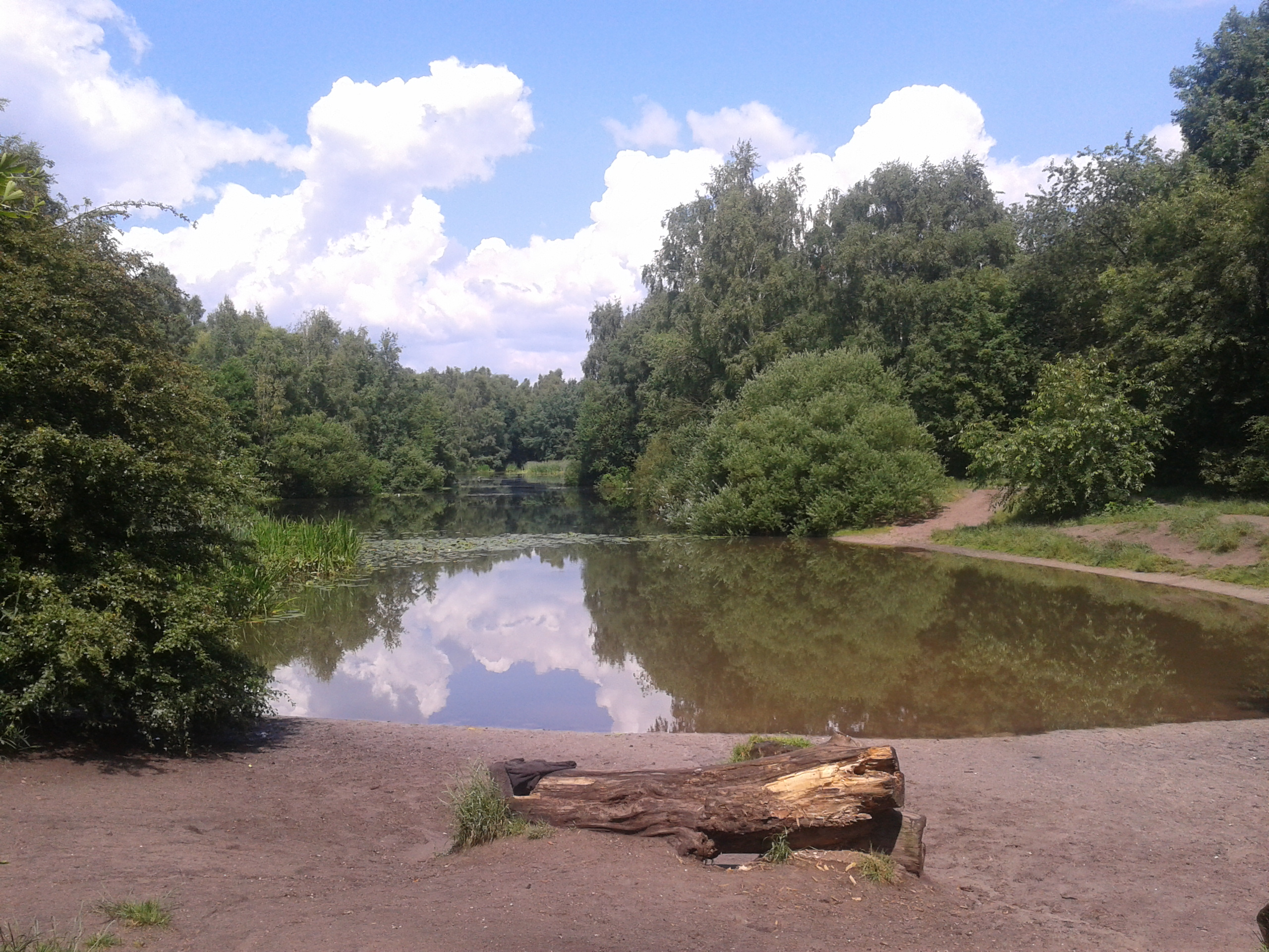 Kleiner See/Teich mit „Hundestrand“ im Naturschutzgebiet „Am Stadtwaldsee (Uni-Wildnis)“ in Bremen; Sekundärbiotop nach Sandgewinnung und Ablagerung von Abraum für Bauvorhaben 1970